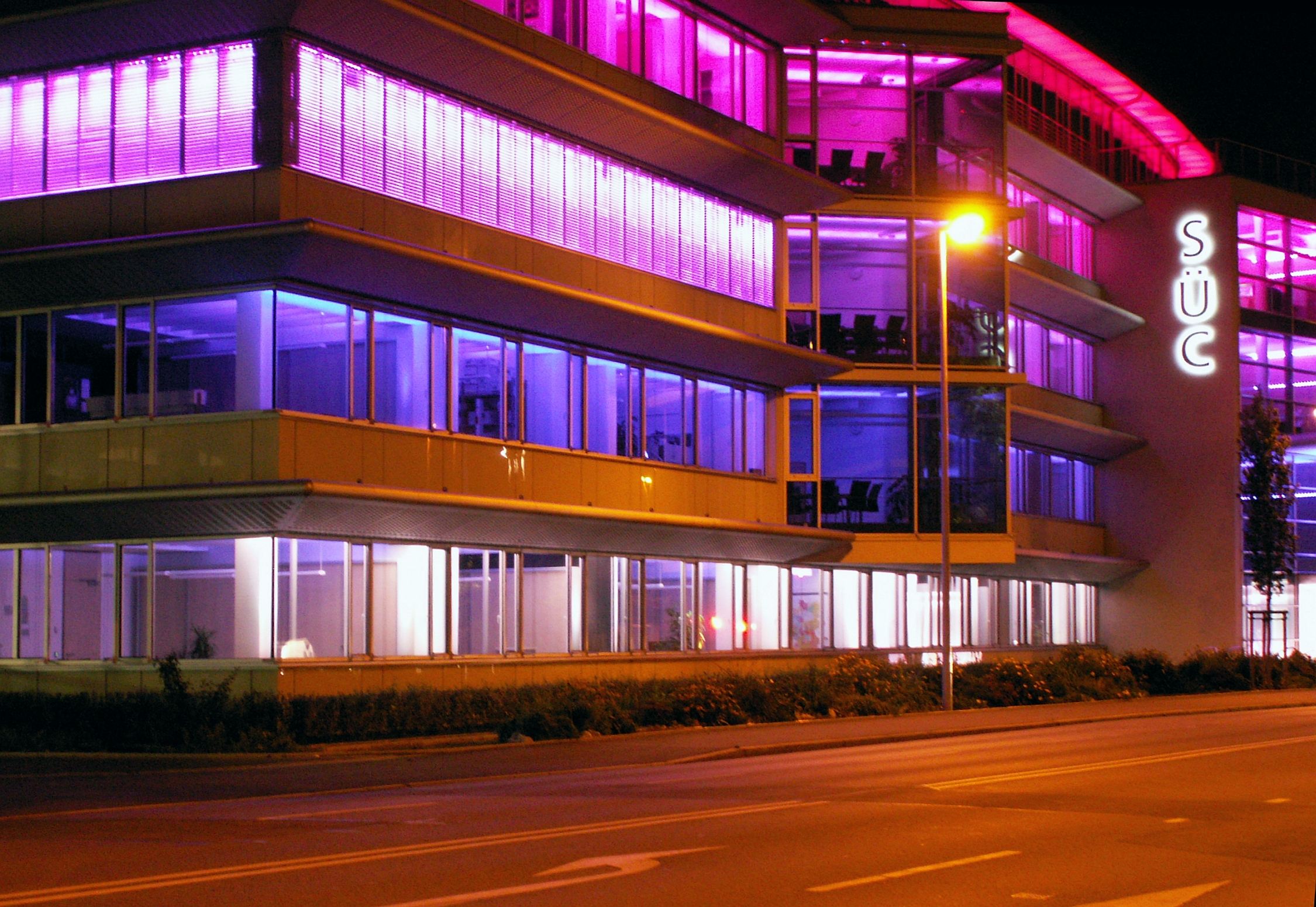 SÜC Städtische Werke Überlandwerke Coburg GmbH Verwaltungsgebäude Bamberger Straße 2-6 in D-96450 Coburg Deutschland, Fassade des Verwaltungsneubaus von 2006 mit farbiger interaktiver LED-Illumination mit über 1700 LED-Platinen Foto 2007 Wolfgang Pehlemann PICT0401